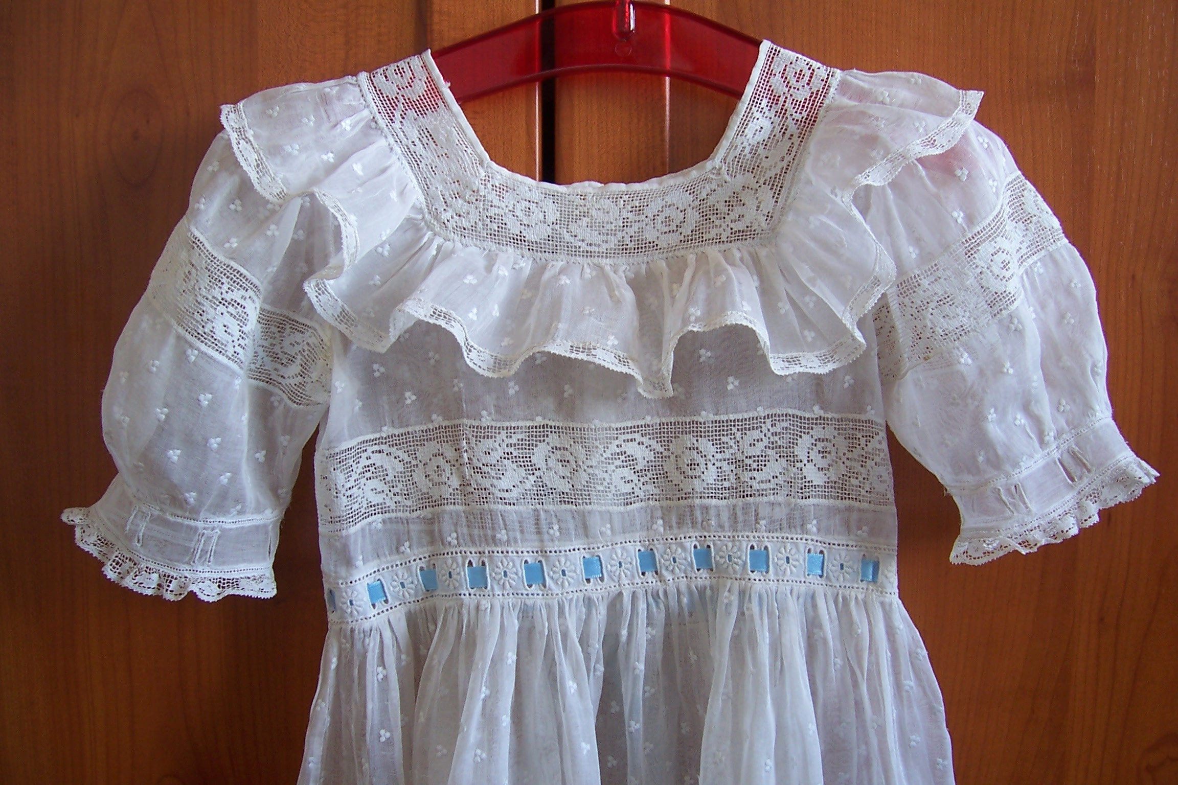 Detalle del cuerpo de un vestido de organdí blanco, bordado, de niña a la moda de los años 40 del siglo XX.